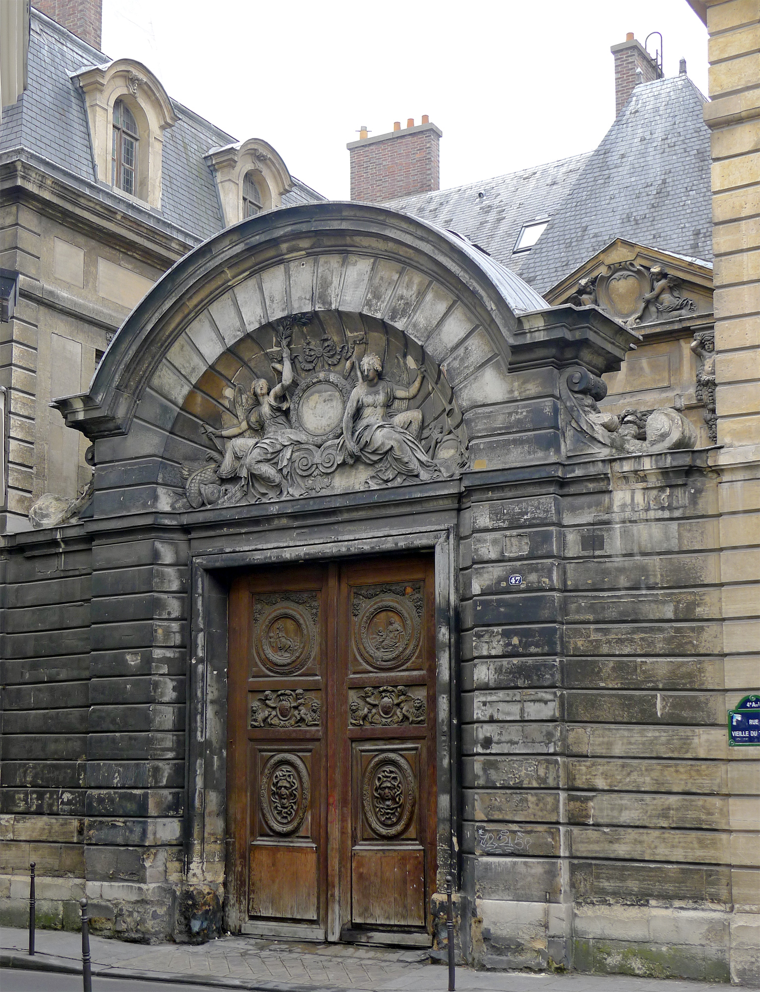 Rue Vielle du Temple (n°47 : hôtel Amelot de Bisseuil) - Paris IV .